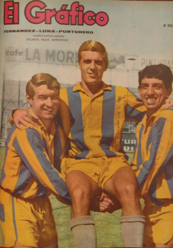 Fernández, Luna y Puntorero, futbolistas del Club Atlético Atlanta, en la tapa de revista El Grafico, 24 de febrero de 1965.